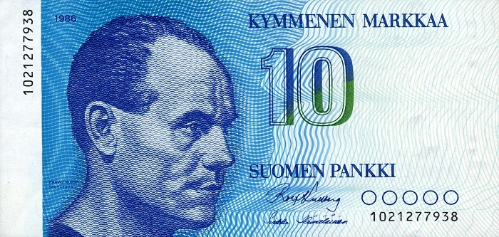 10 markkaa